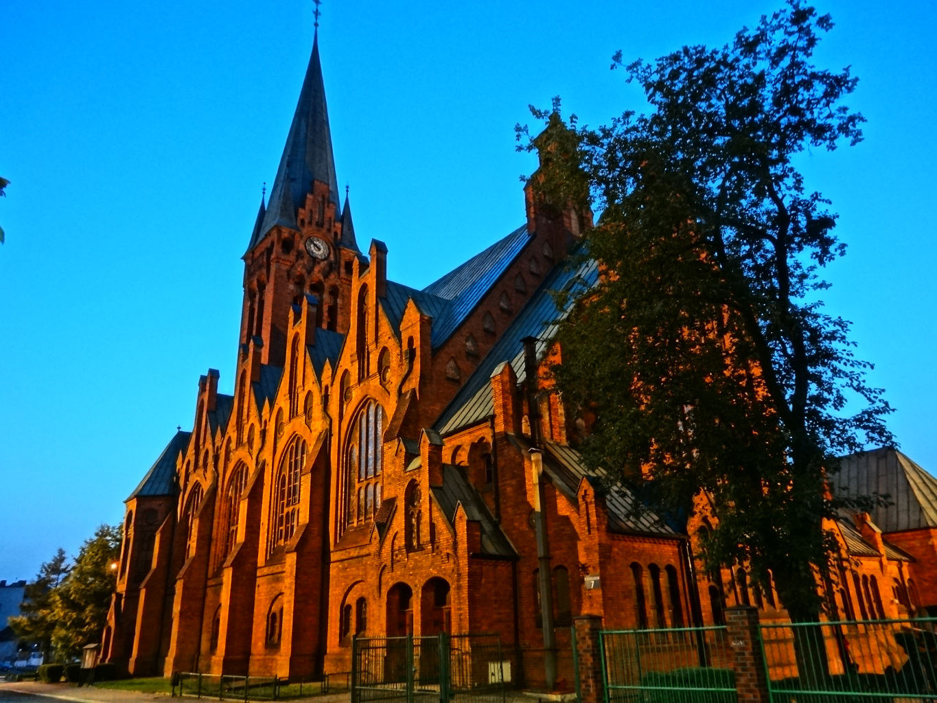 Kościół św. Andrzeja Boboli (1903 r., Jezuicki, do 1945 r. fara ewangelicka) w Bydgoszczy